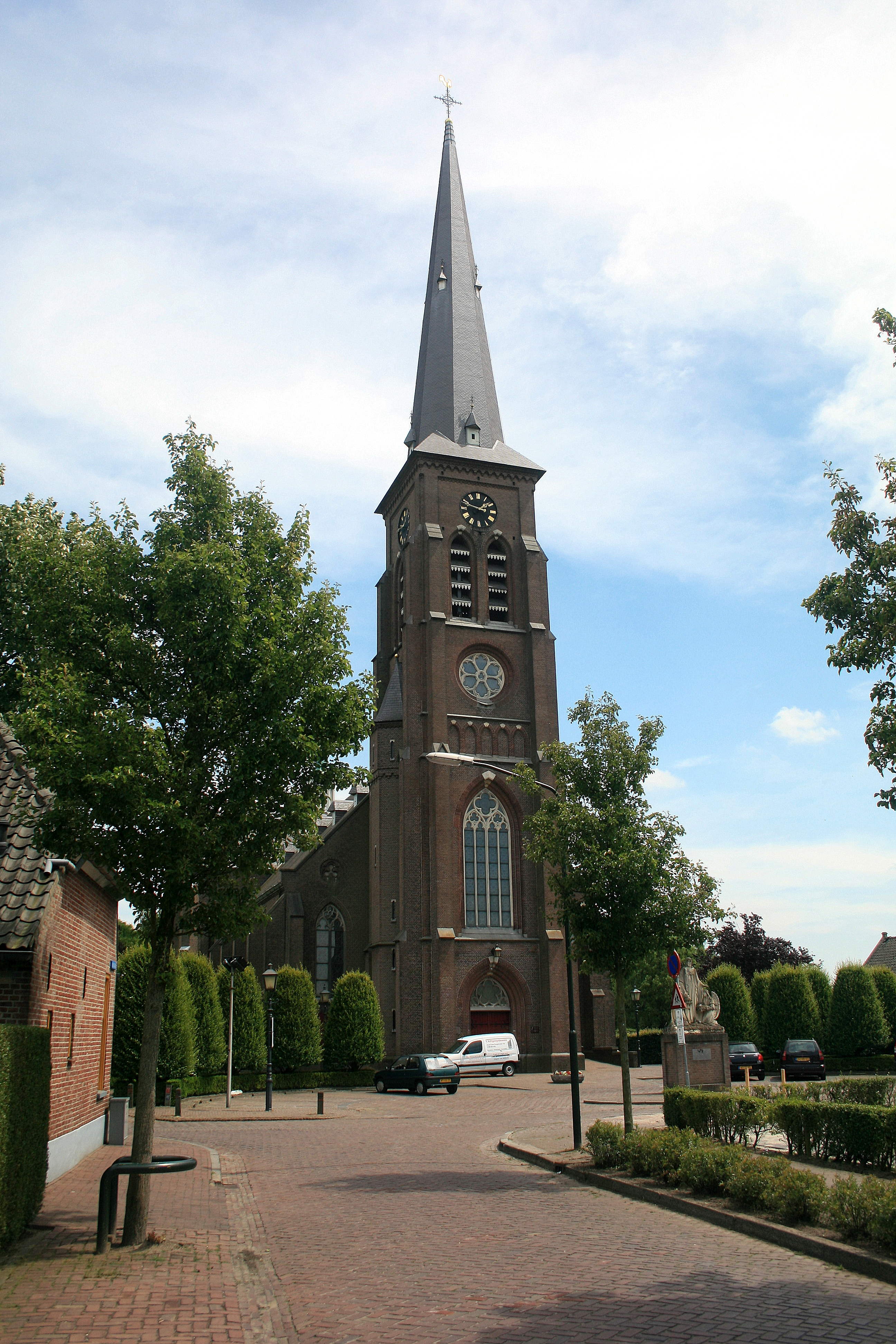 Liempde - Dorpsstraat 36 - St. Jans Onthoofdingskerk